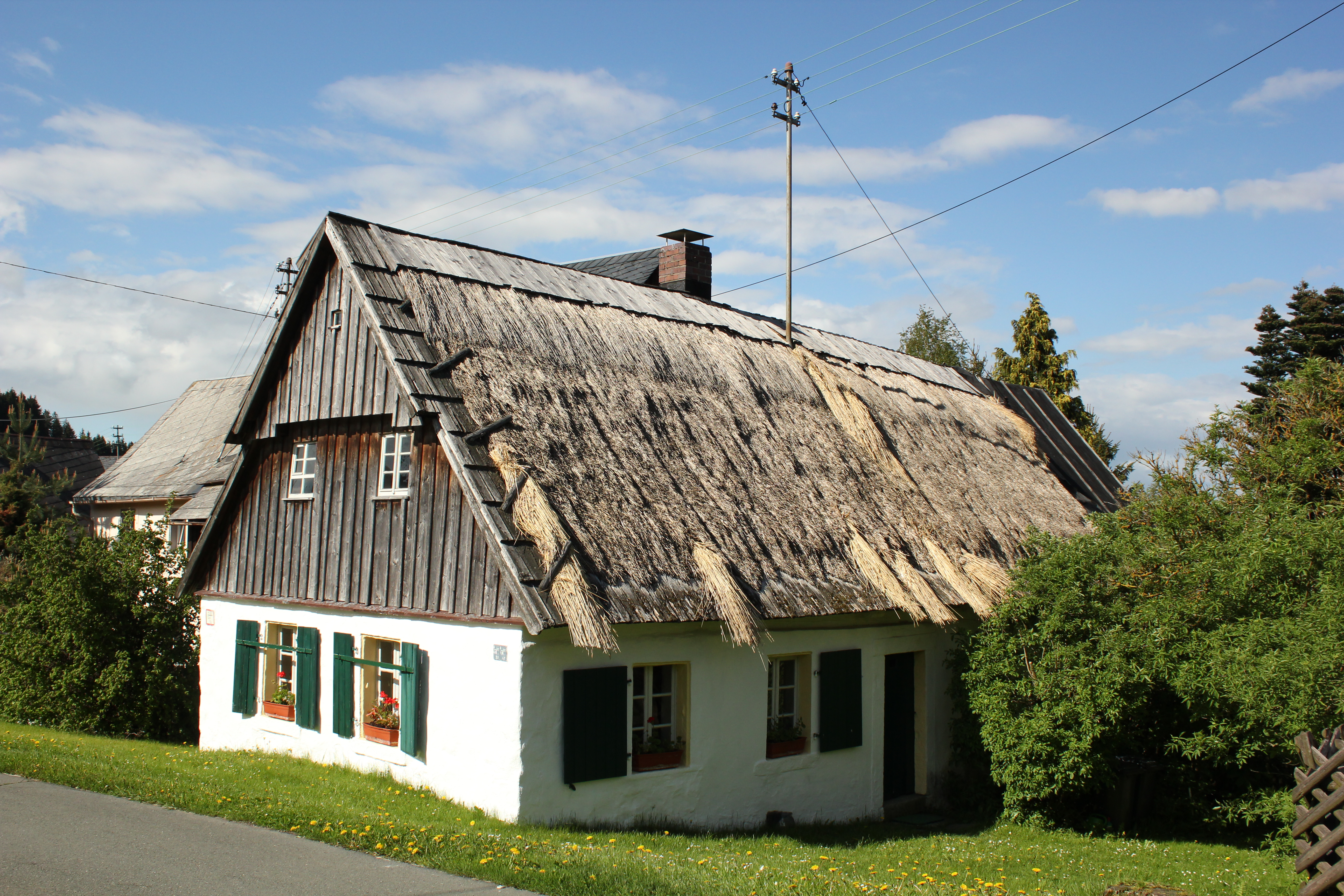 Helmbrechts Kleinschwarzenbach Zum Weberhaus 10